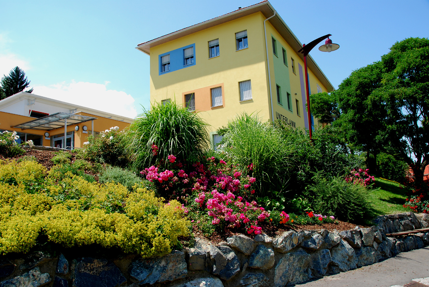 Blumenanlage auf dem Schulberg